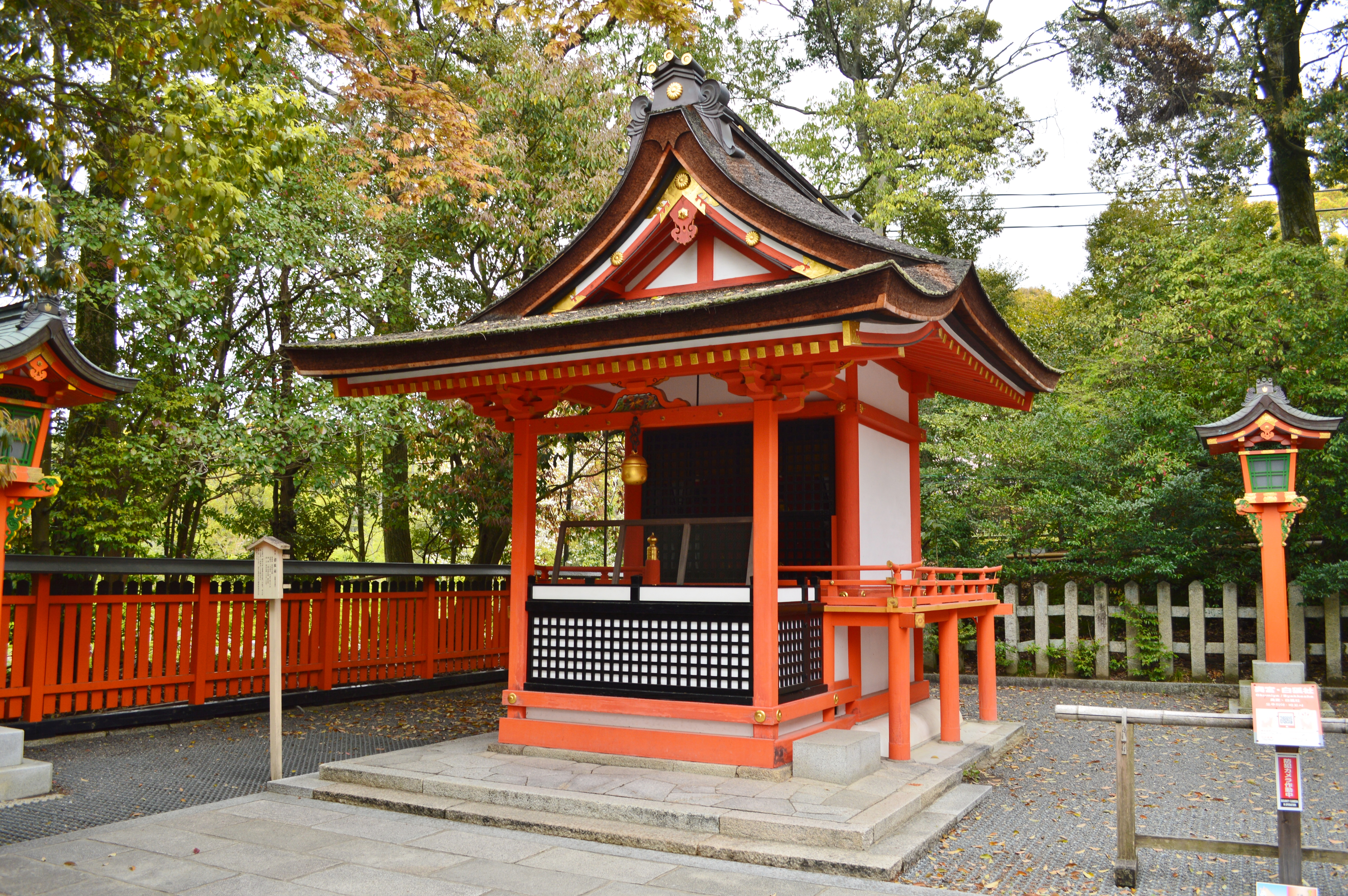 伏見稲荷大社 境内白狐社 Nikon D3200